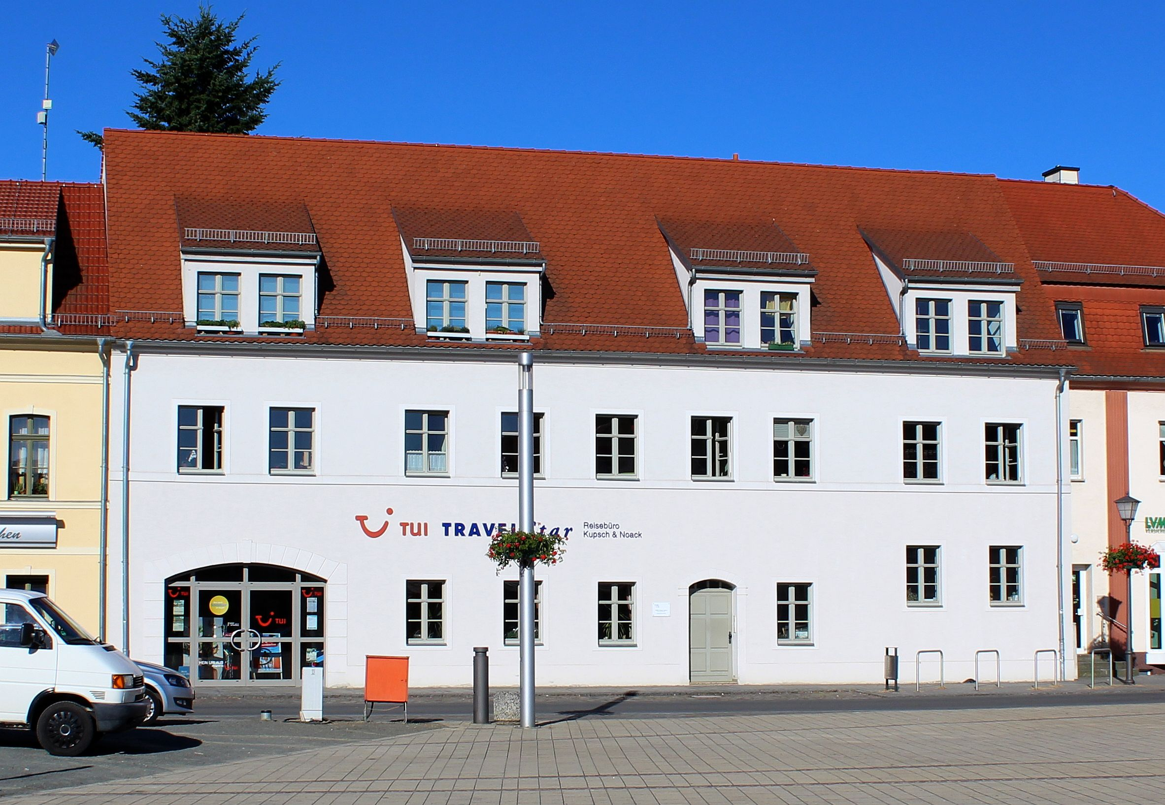 Das Baudenkmal Lange Str. 3 in Elsterwerda.